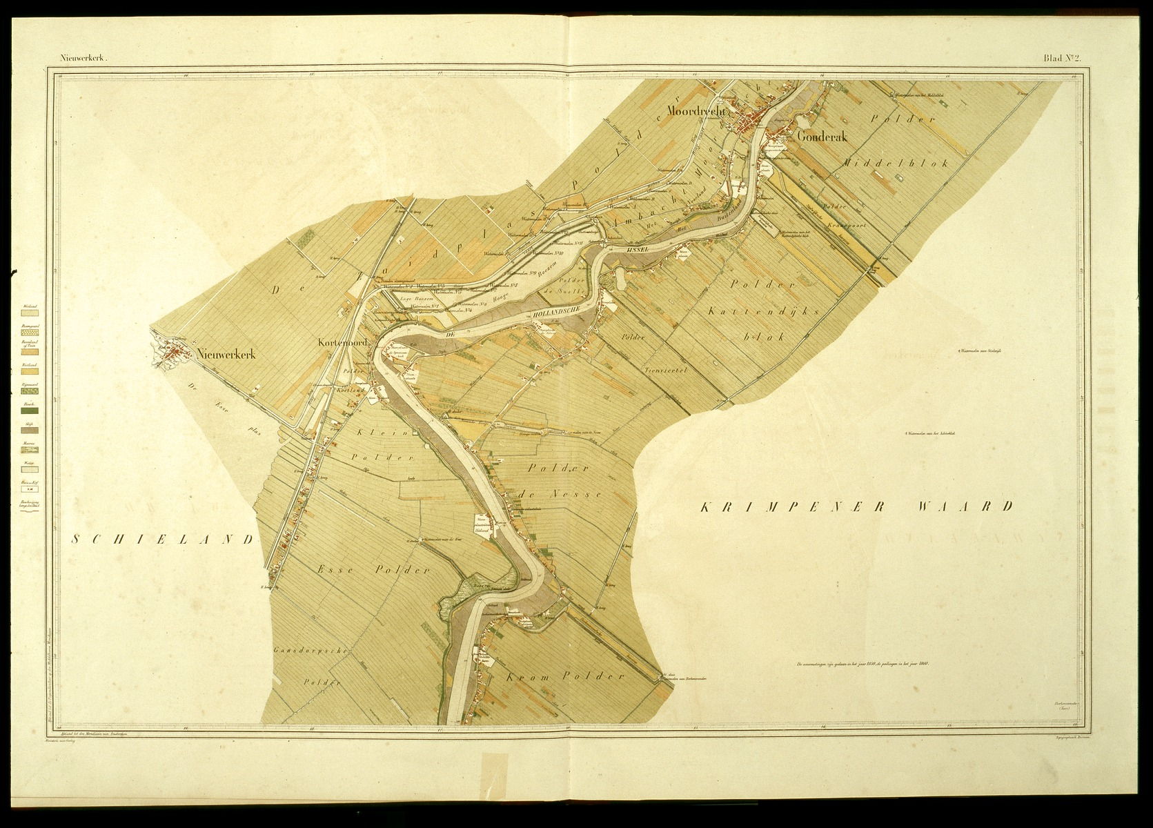 Kaart van de rivier de Hollandsche IJssel van Gouda tot IJsselmonde, in drie bladen, 1830-1862